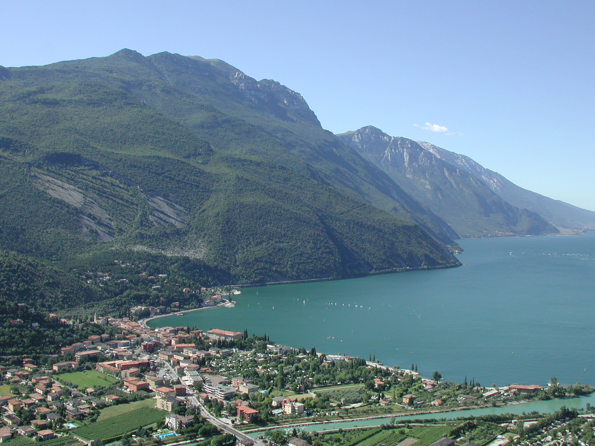 vista generale di Torbole (comune di Nago-Torbole, provincia di Trento)